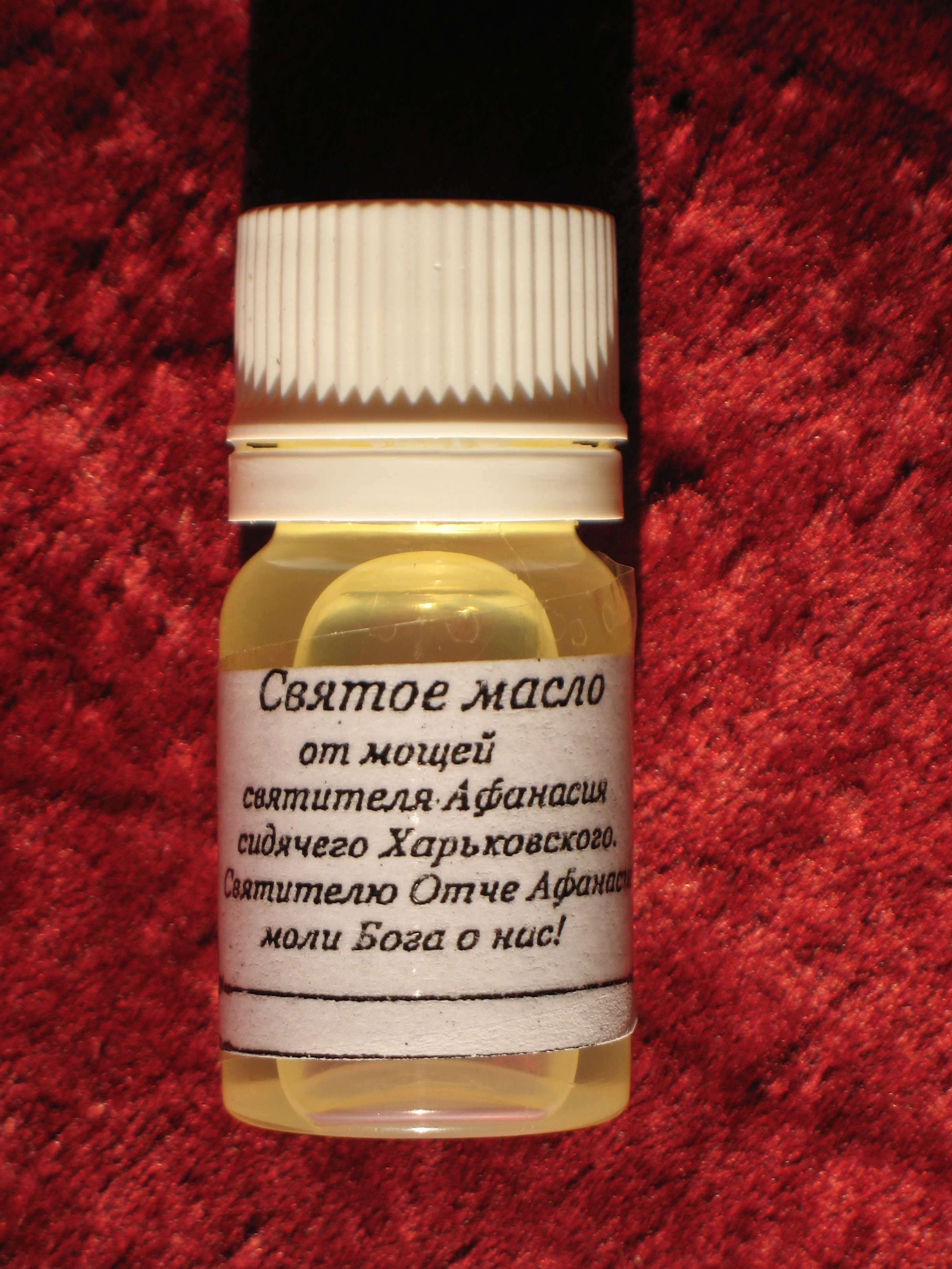 Масло, освящённое на мощах православного святого Патриарха Цареградского Афанасия Пателлария, Лубенского и Харьковского чудотворца (Благовещенский собор, Харьков).